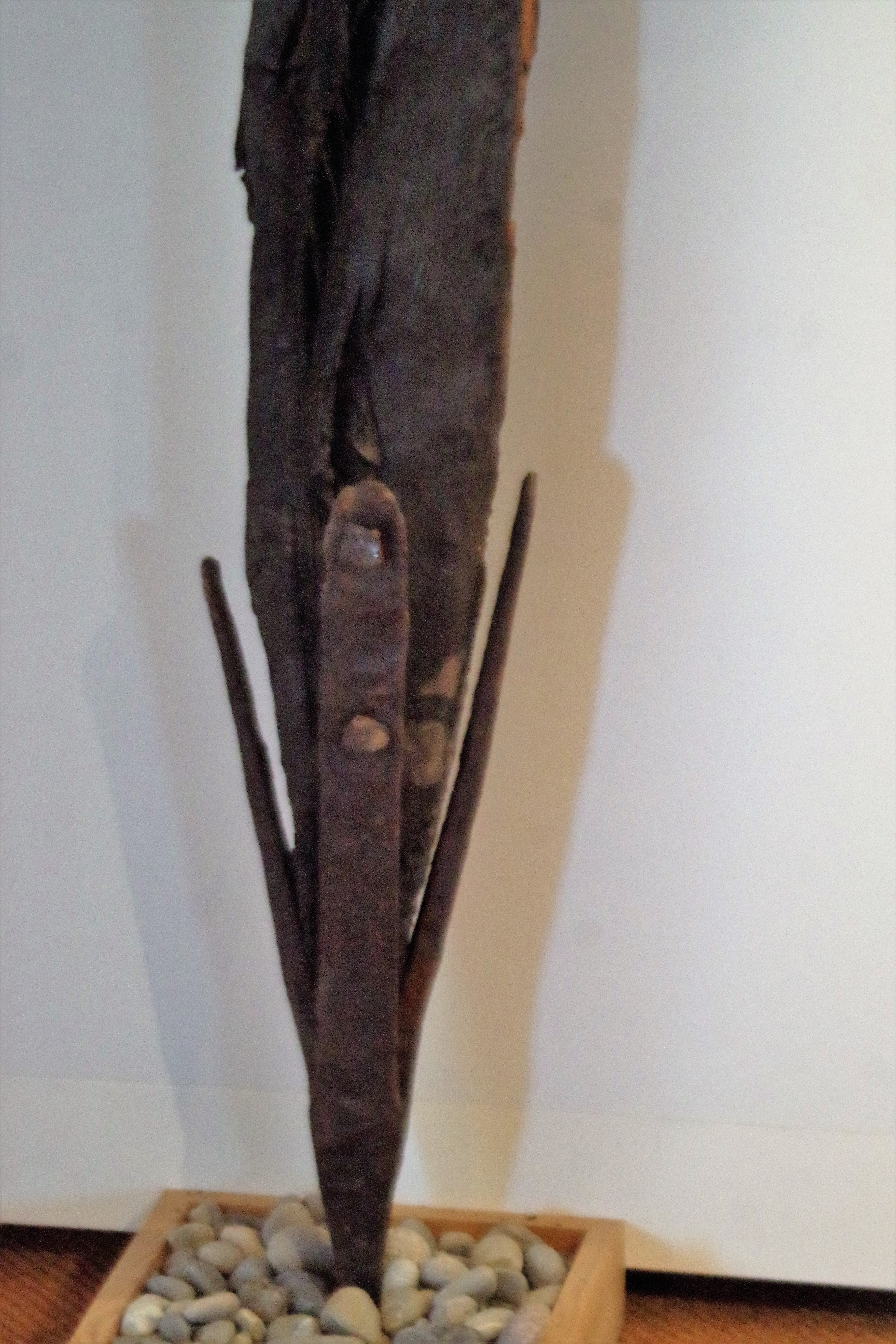 Museum Höfli in Bad Zurzach: Pfahl aus einer Pfahlgründung der Rheinbrücke Zurzach-Rheinheim mit eisernem Pfahlschuh